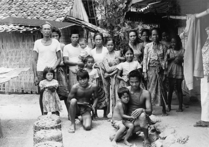 Negatief. Bevolking van het dorp Rapa Daya, onderdistrict Omben